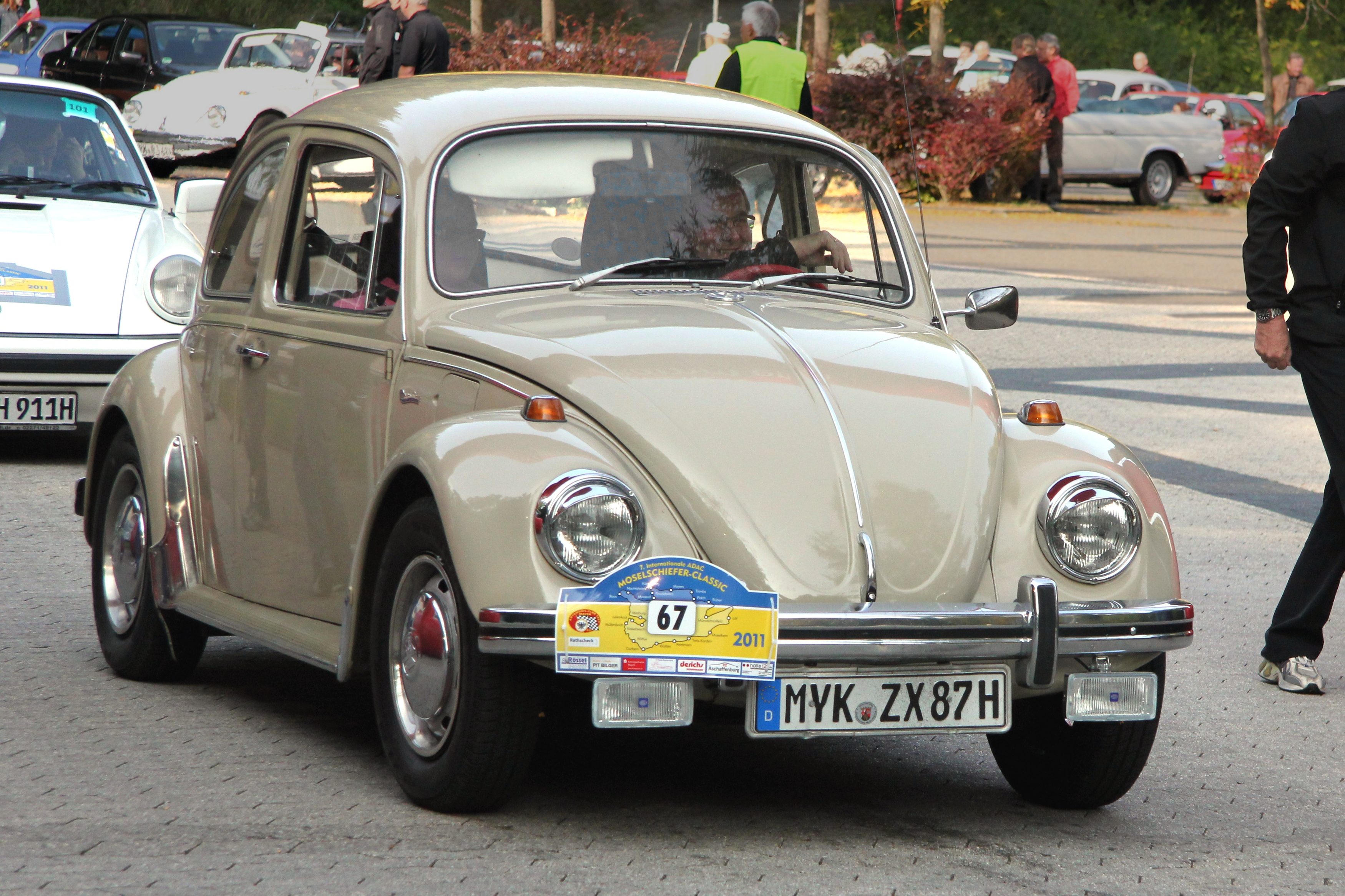 Landrat Dr. Alexander Saftig, Landkreis Mayen-Koblenz, mit seinem VW Käfer, Baujahr 1967, und Tochter bei der Moselschiefer-Classic